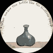 Taumatropio fiori e vaso, 1825 Frame 2.png